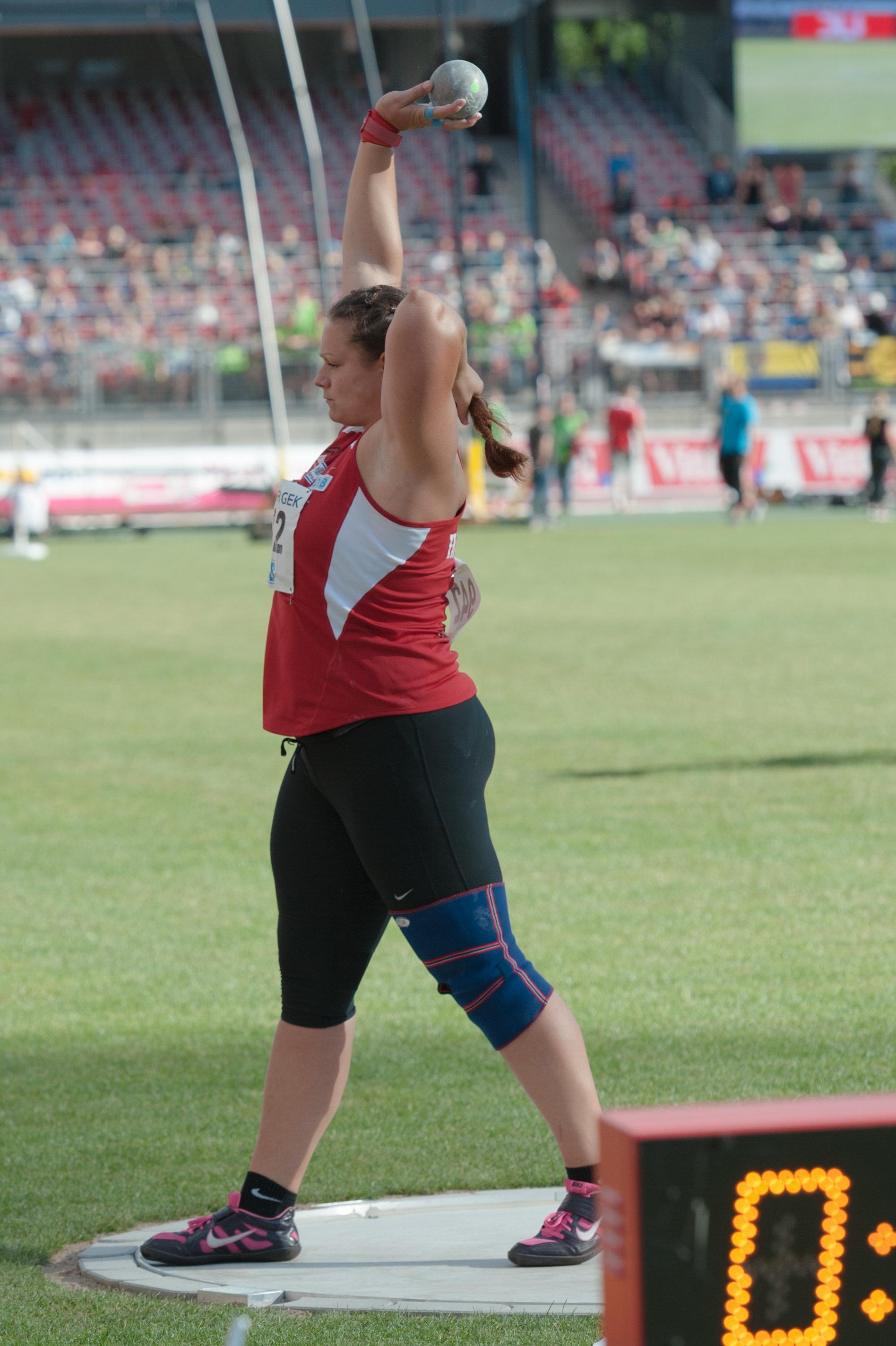 Deutsche Leichtathletik-Meisterschaften 2015: Christina Schwanitz, LV 90 Erzgebirge